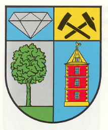 Wappen von Steinbach am Glan